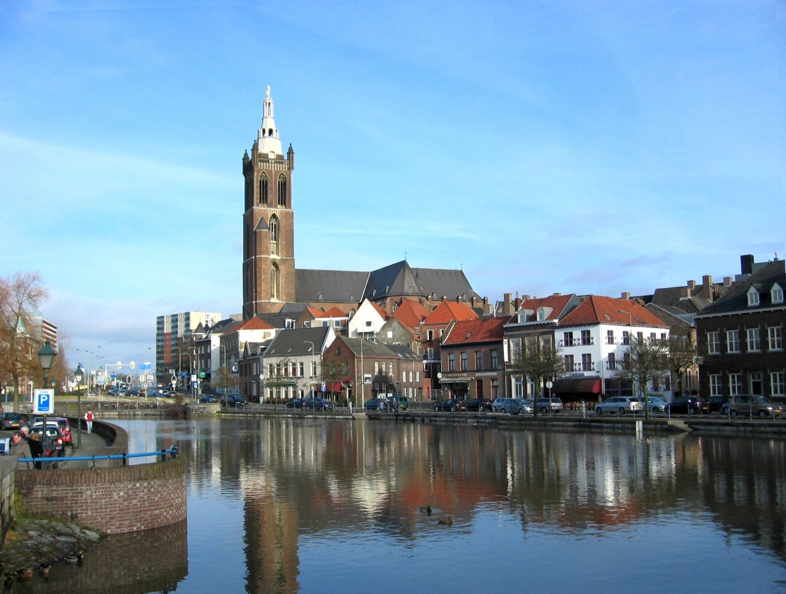 Hochwasser auf Maas und Rur, hier die Rur in Roermond abgebildet